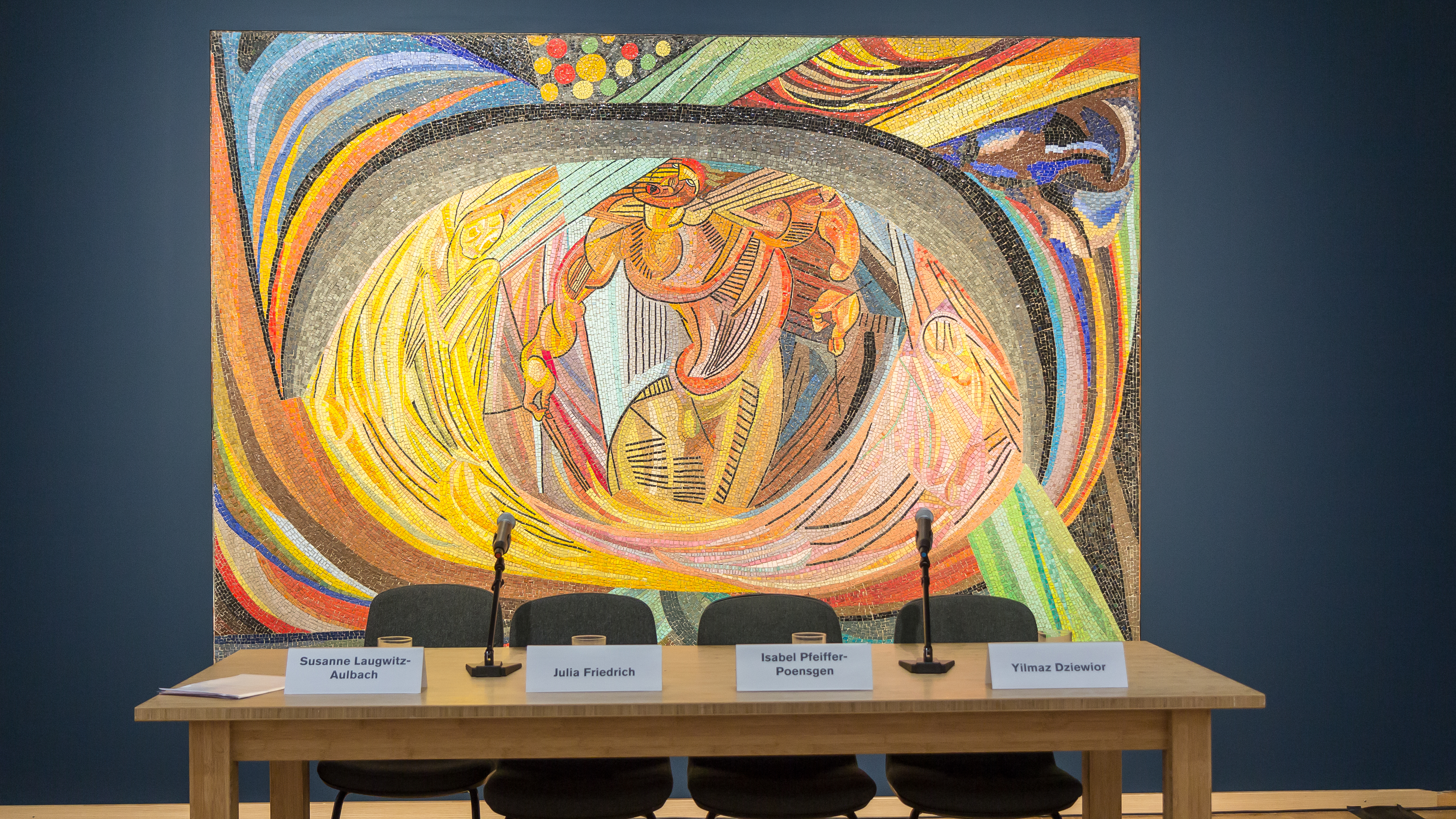 Otto Freundlich - Kosmischer Kommunismus. Ausstellung im Museum Ludwig Köln